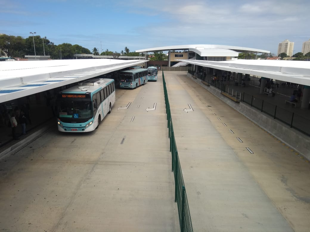 Terminal de Integração Urbano da Messejana em Fortaleza, Ceará, Brasil.